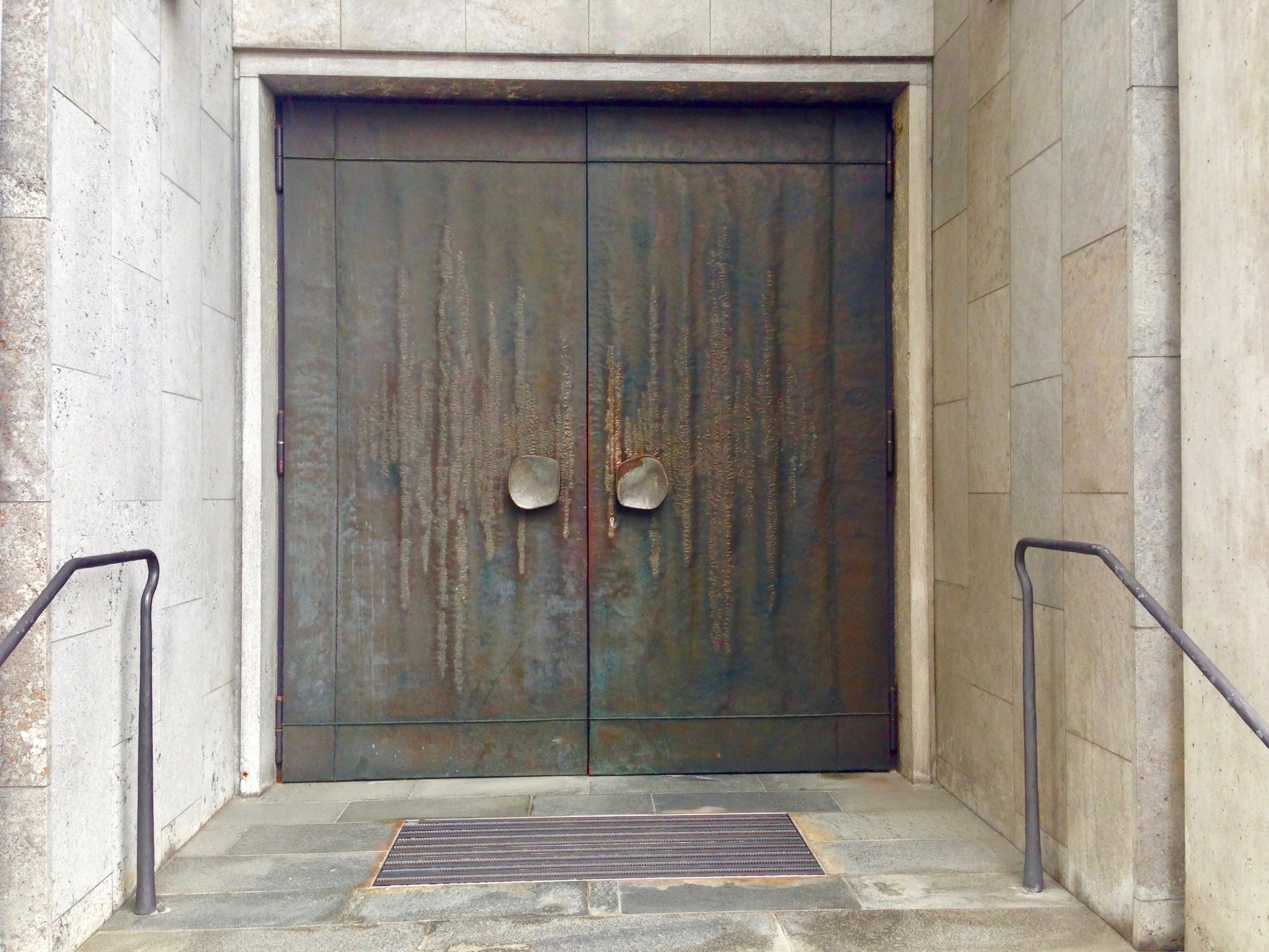 Die von Erich Walter Stadler geschaffene Flügeltüre auf der Frontseite der Kath. Pfarramt St. Maria in Meckenbeuren